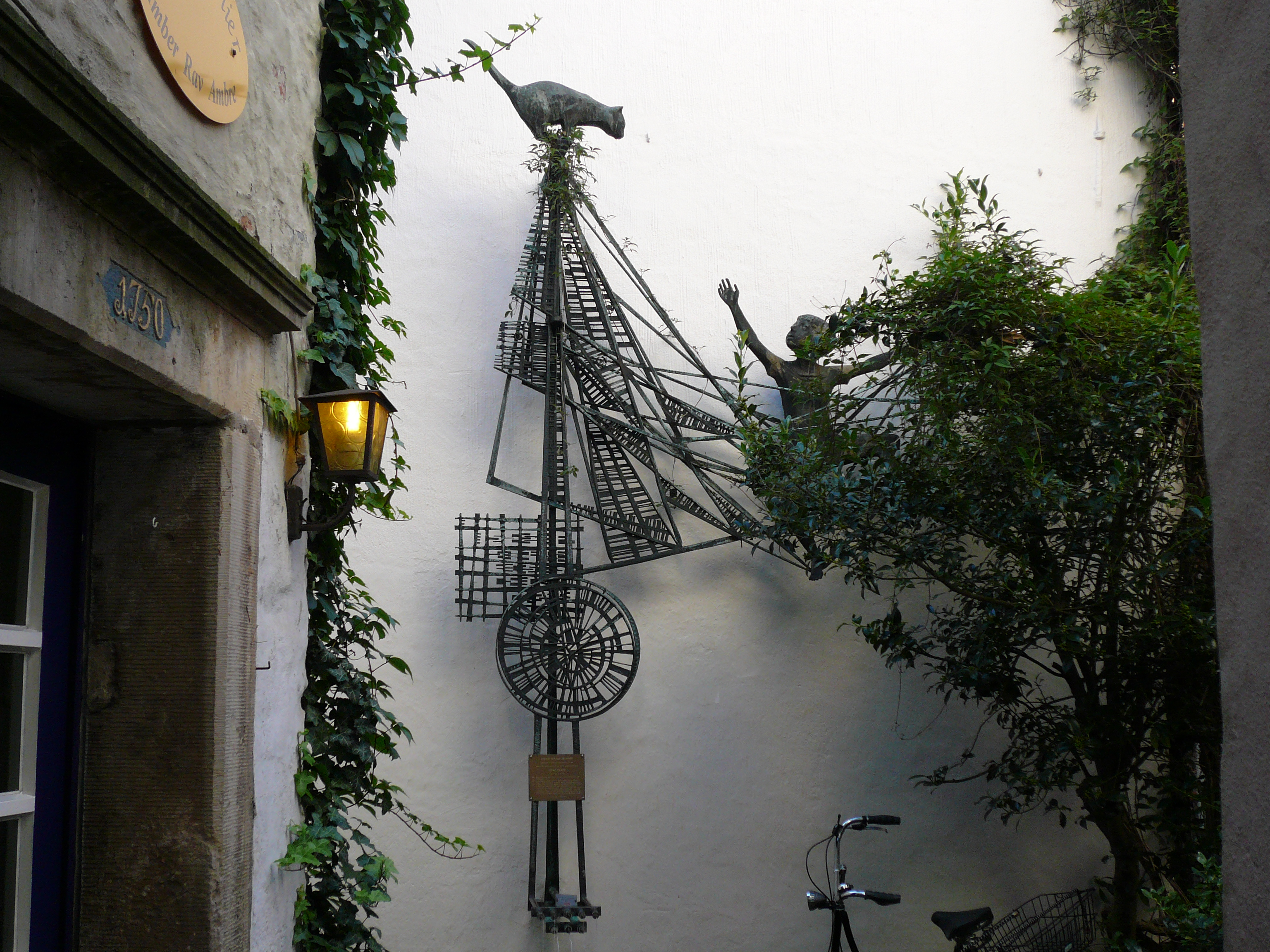 Die Ottjen-Alldag-Plastik bei dem Ottjen-Alldag-Brunnen im Schnoorviertel in Bremen, Deutschland. Die Ottjen-Alldag-Pastik wurde 1964 von dem deutschen Bildhauer Claus Homfeld geschaffen.